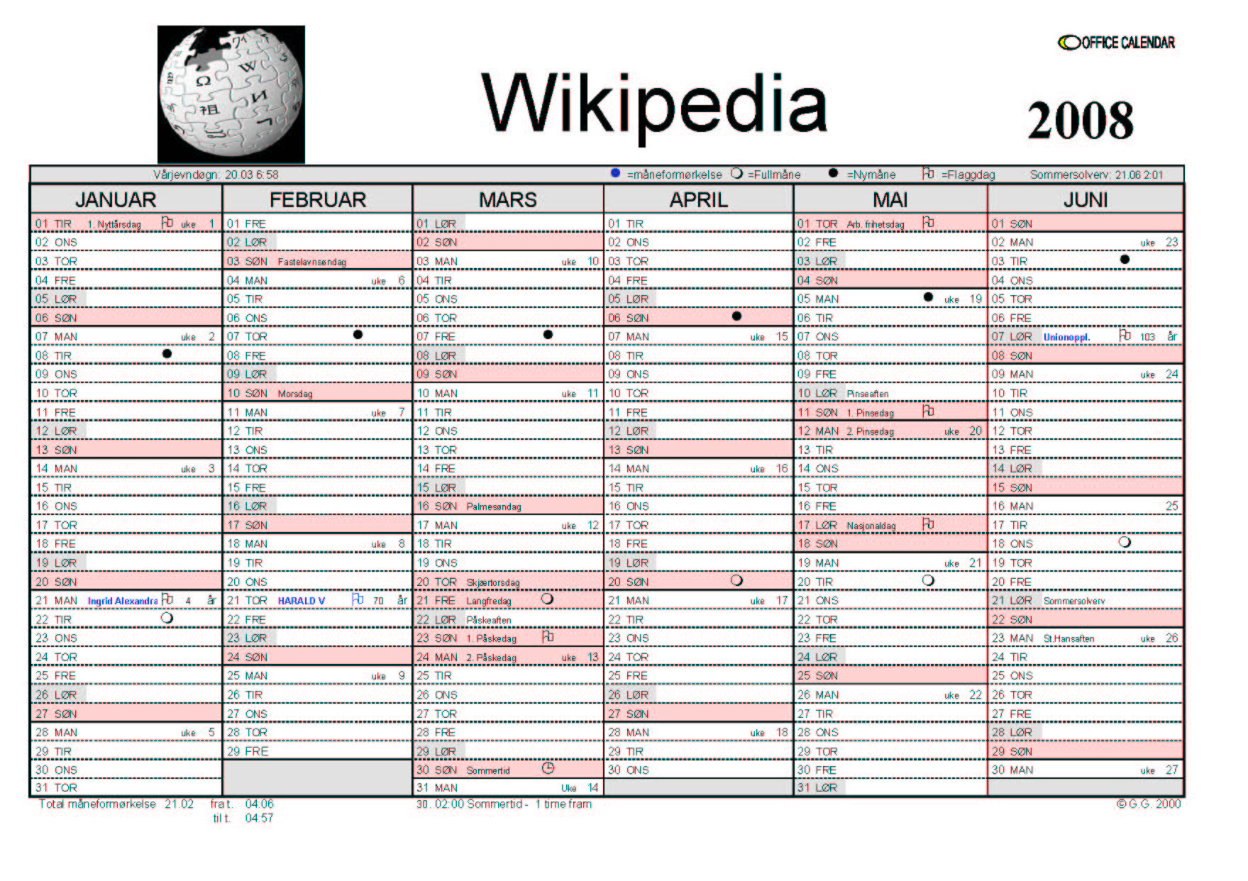 Kalender (Gregoriansk kalender) for første halvår av 2008 med helligdager, flaggdager, merkedager, kongelige fødselsdager, månefaser, jevndøgn, solverv og formørkelse.